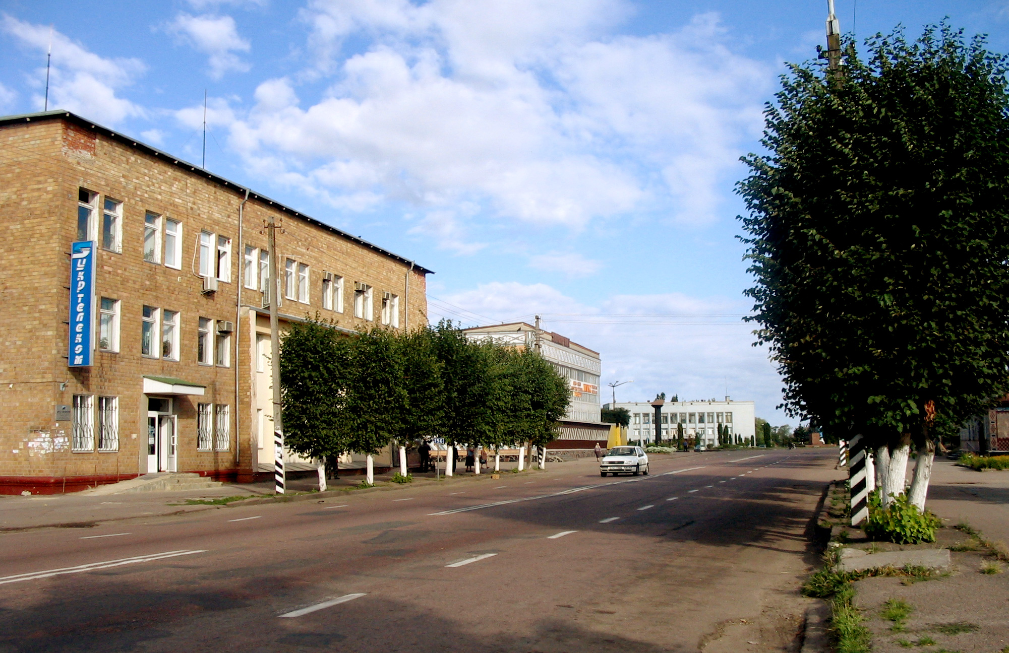 вулиця смт. Черняхів (Черняхівський район, Житомирської області)